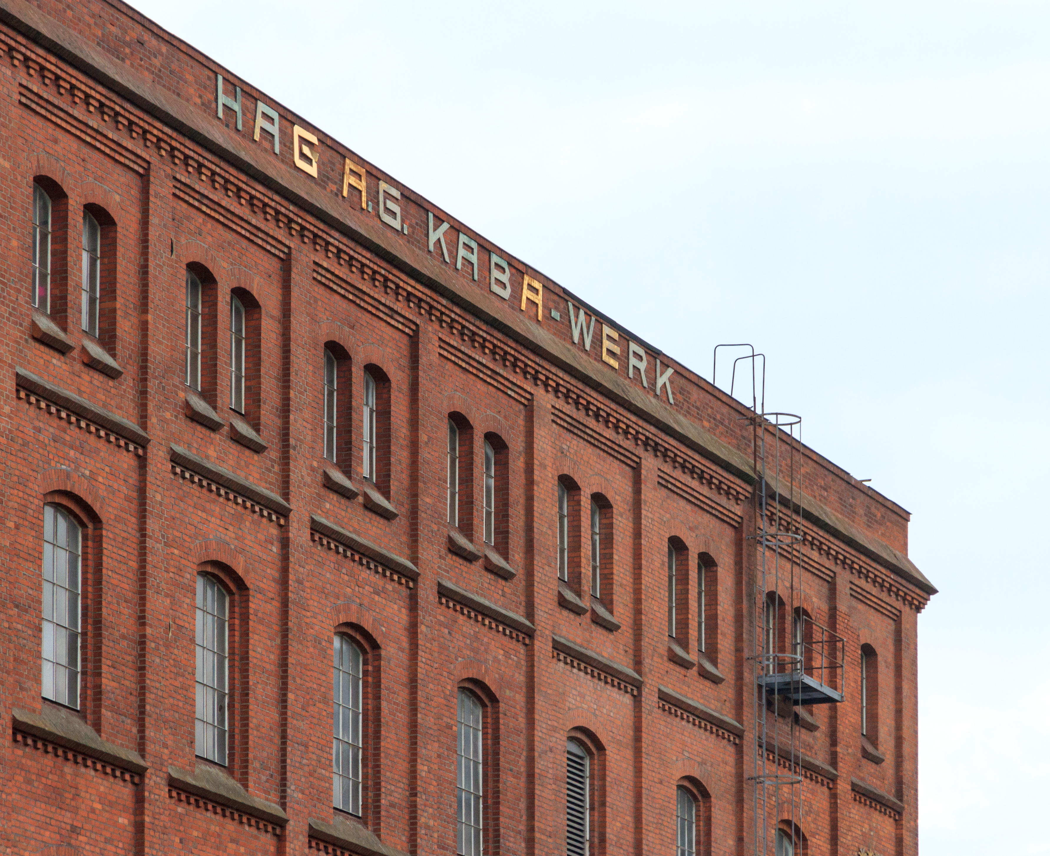 Das ehemalige Kaba-Werk in Bremen